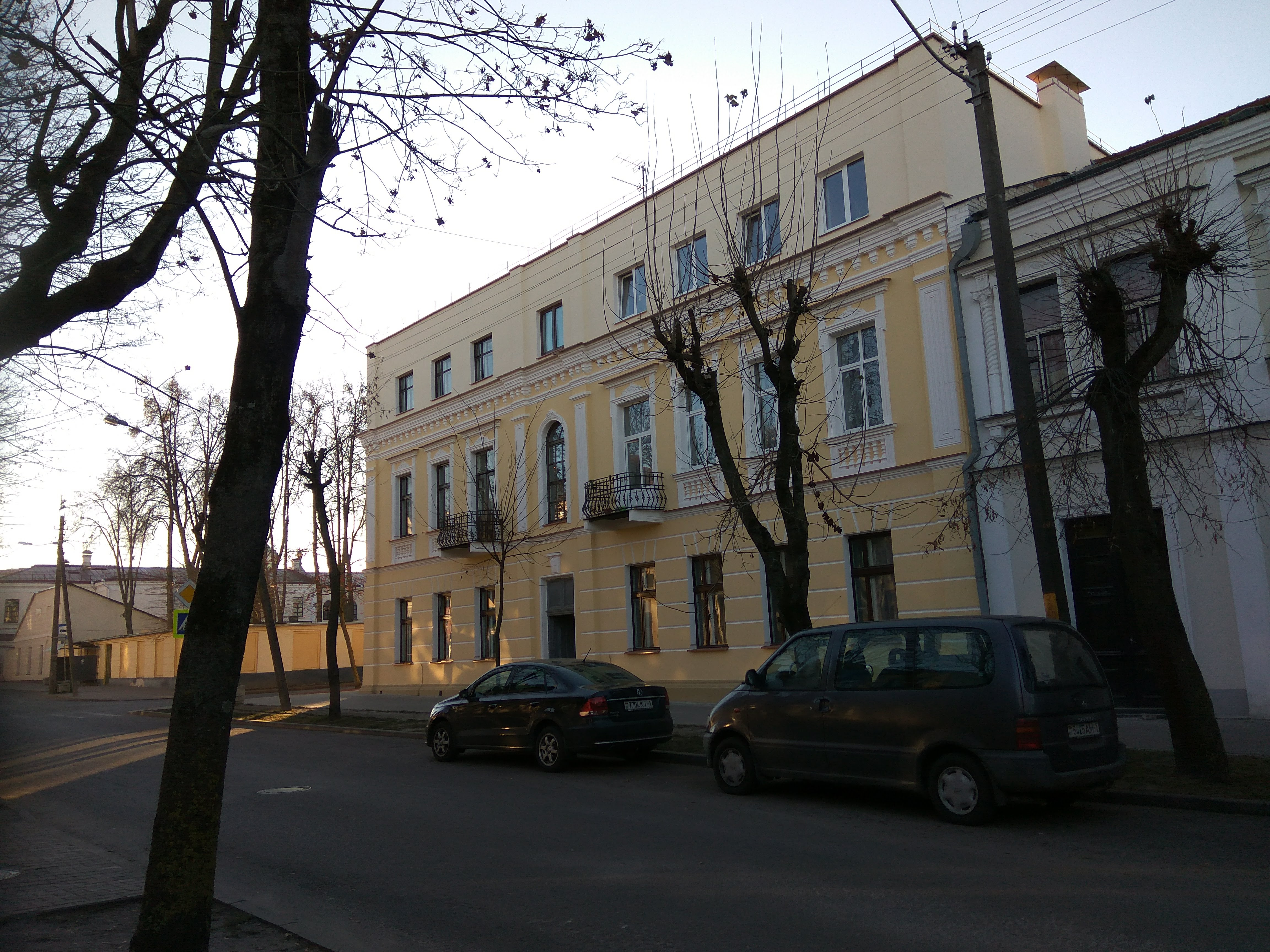 Брэст. Вуліца Савецкіх пагранічнікаў